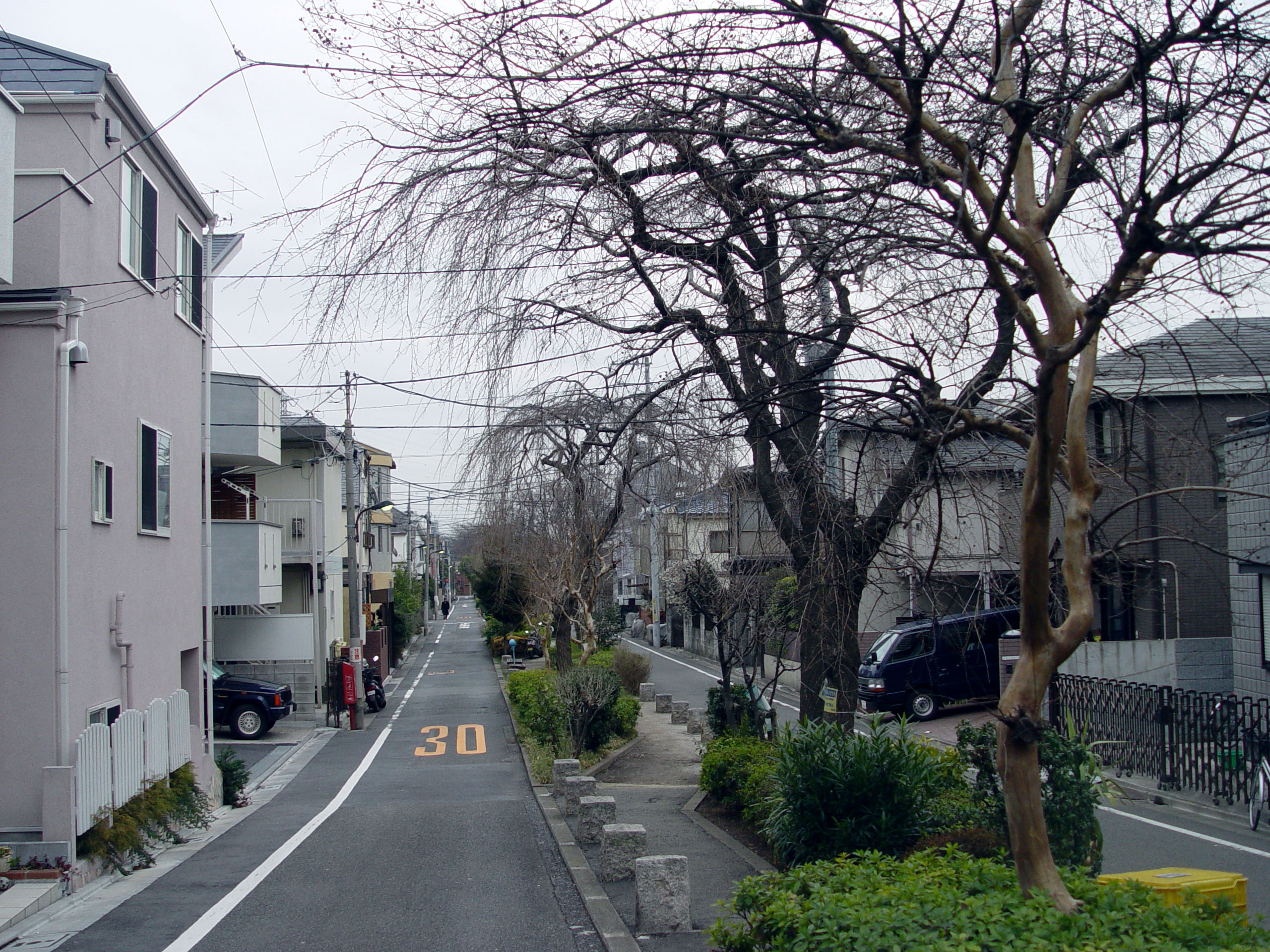 Kakinokizaka 1chome, Meguro, Tokyo, Japan柿の木坂